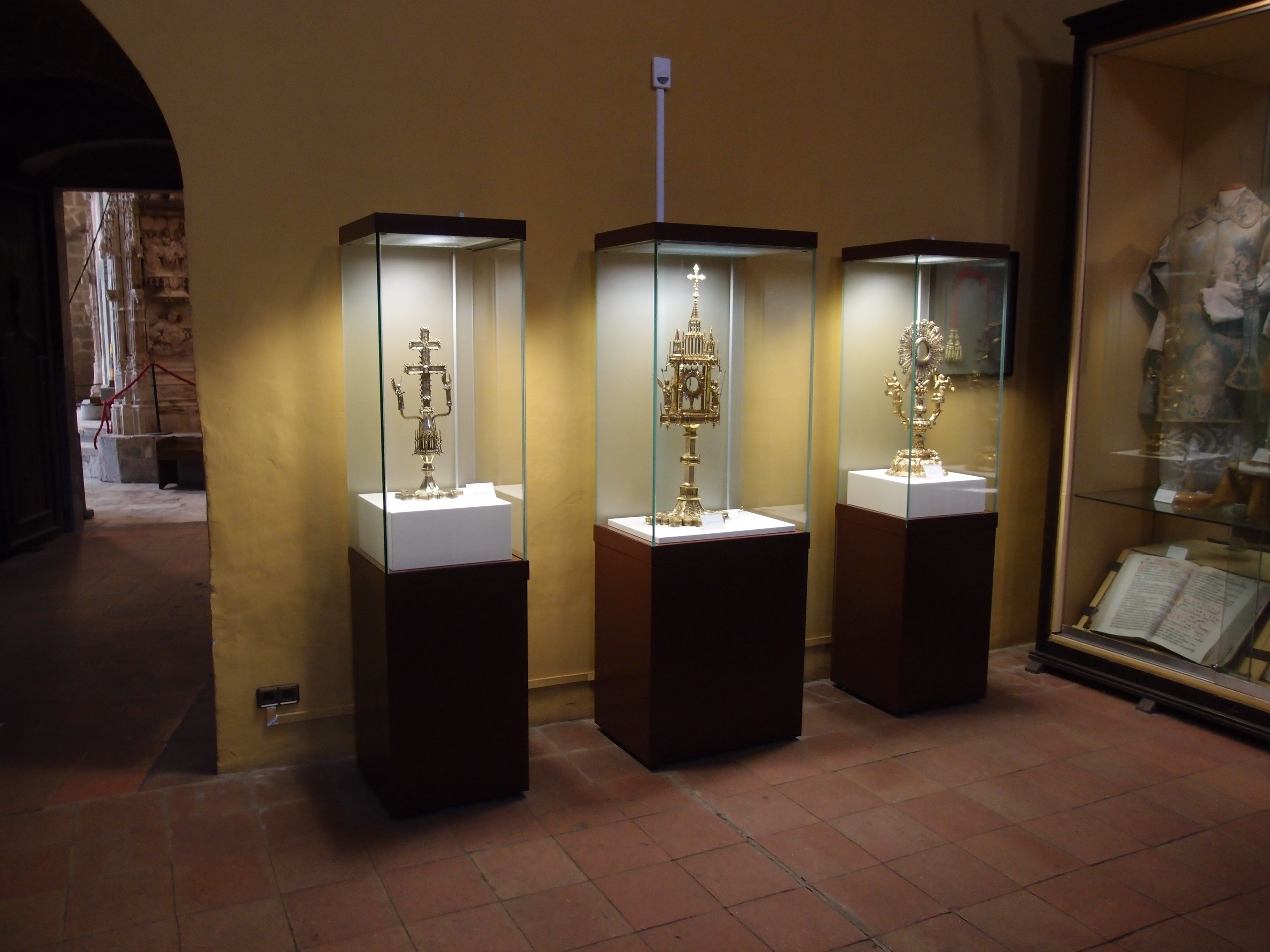 Basílica de Santa María (Castelló d’Empúries), Museumsbereich - Katalonien/Spanien Datum: 29.09.2011 Urheber: M. Pfeiffer alias Gordito1869 Quelle: Privates Fotoarchiv des Urhebers